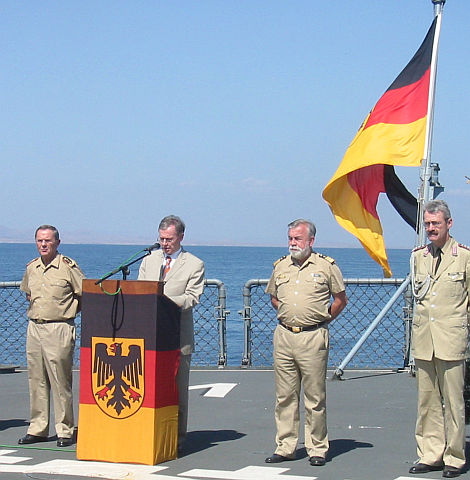 Der damalige Bundespräsident Horst Köhler bei seiner Ansprache auf der deutschen Fregatte Mecklenburg-Vorpommern neben dem Generalinspekteur der Bundeswehr General Wolfgang Schneiderhan und dem Inspekteur der Marine Vizeadmiral Lutz Feldt.